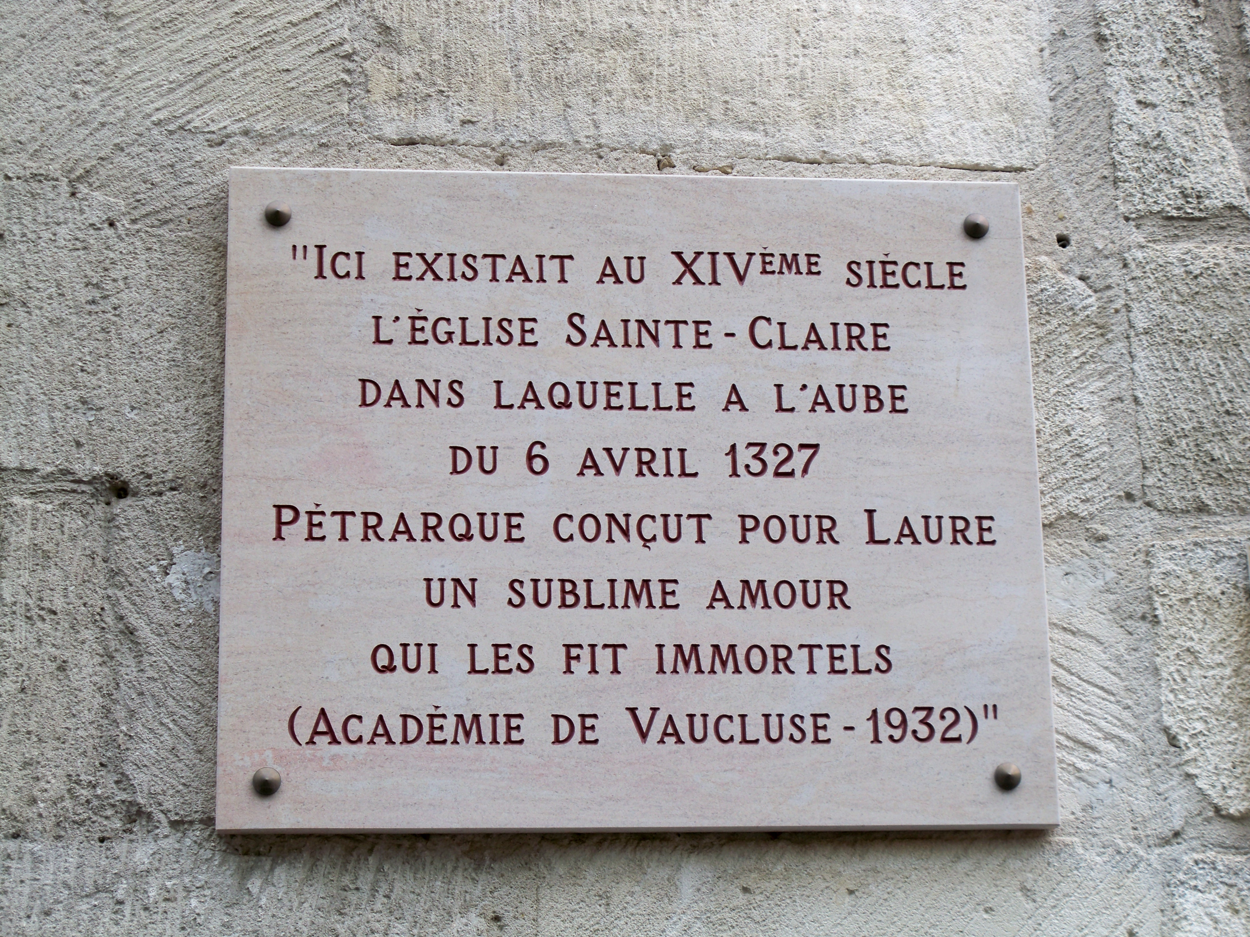 Plaque église Sainte Claire